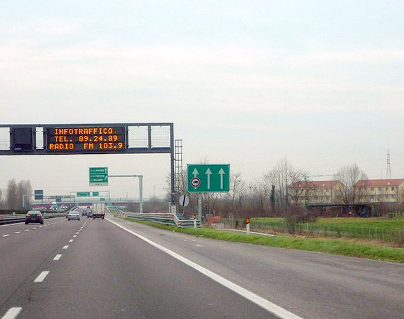 Autostrada A57 - Tangenziale di Mestre nell'ex tratto dell'A4 sostituito dal Passante di Mestre